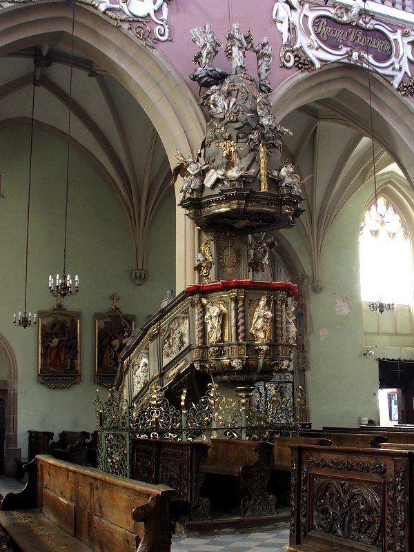 Ambona w kościele pw. Wniebowstąpienia Najświętszej Marii Panny w Kłodzku dłuta Michaela Klahra